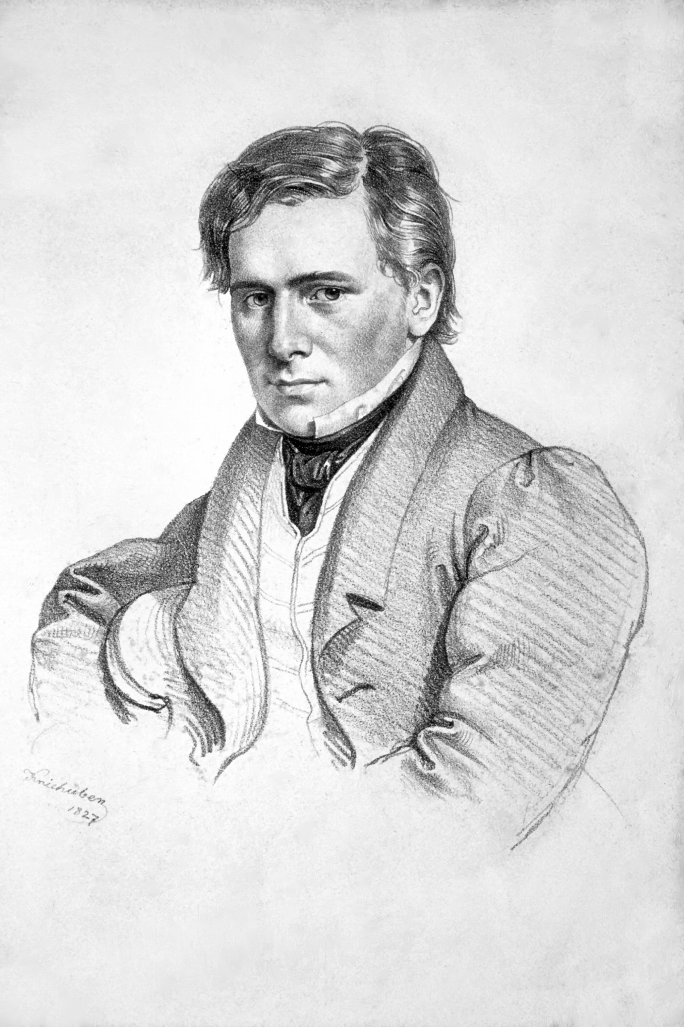 Moritz von Schwind (1804-1871), Austrian painter